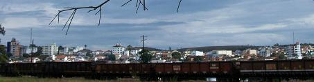 Ferrovia centro atlântica